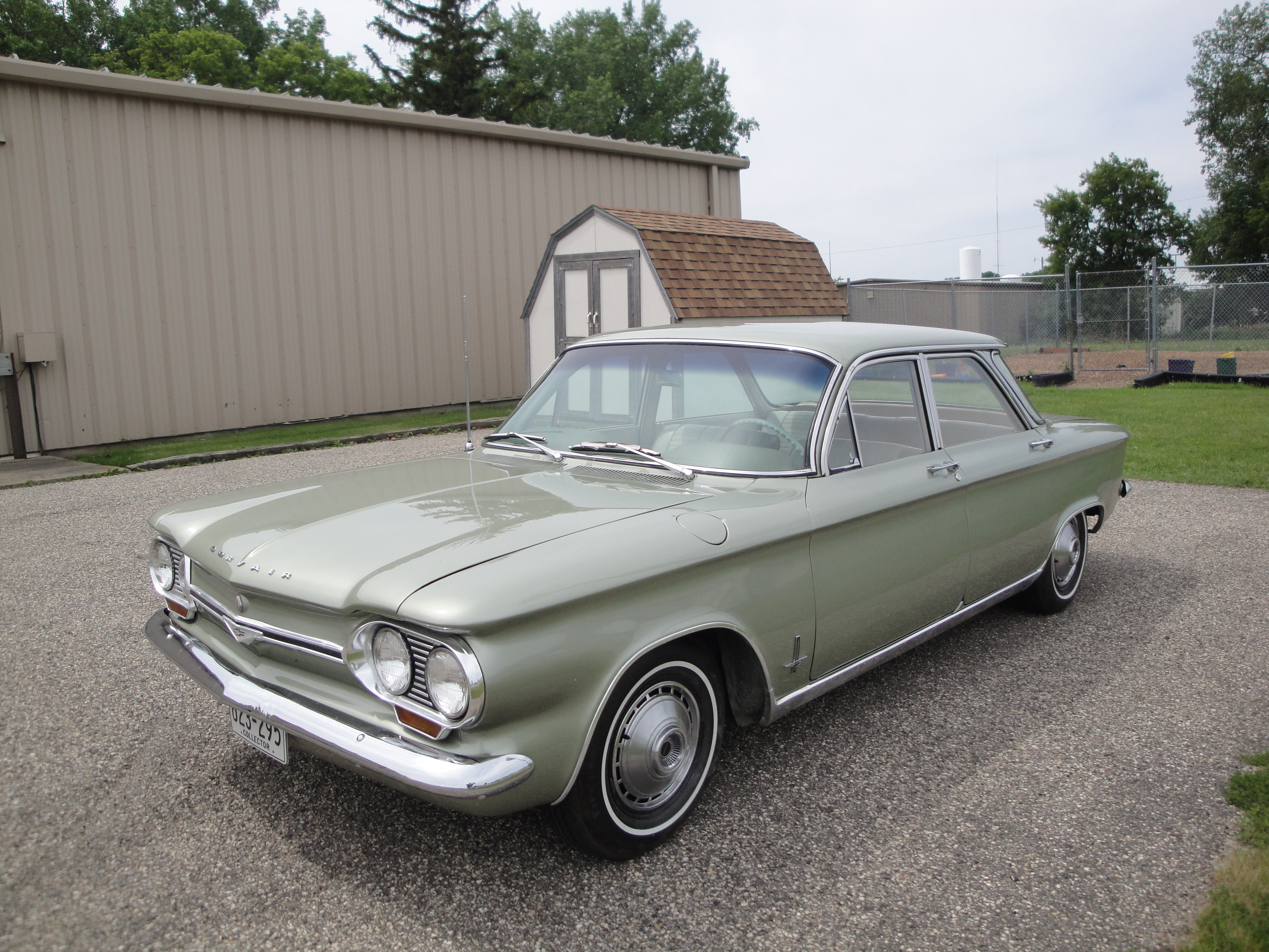 64 Chevrolet Corvair Monza